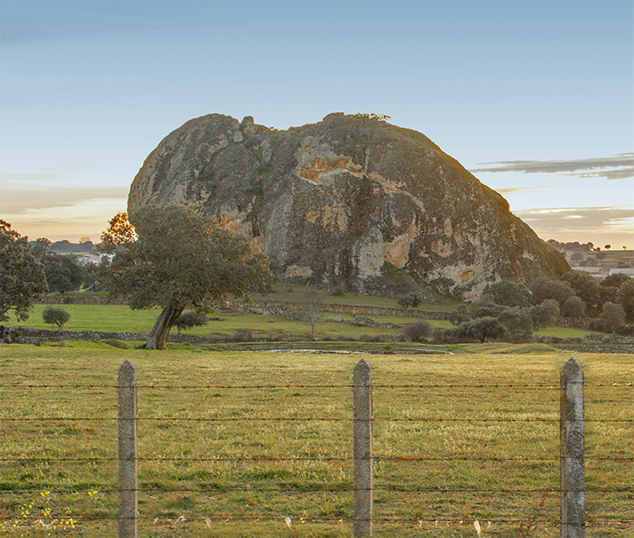 La Peña de La Peña, Castilla y León, España.